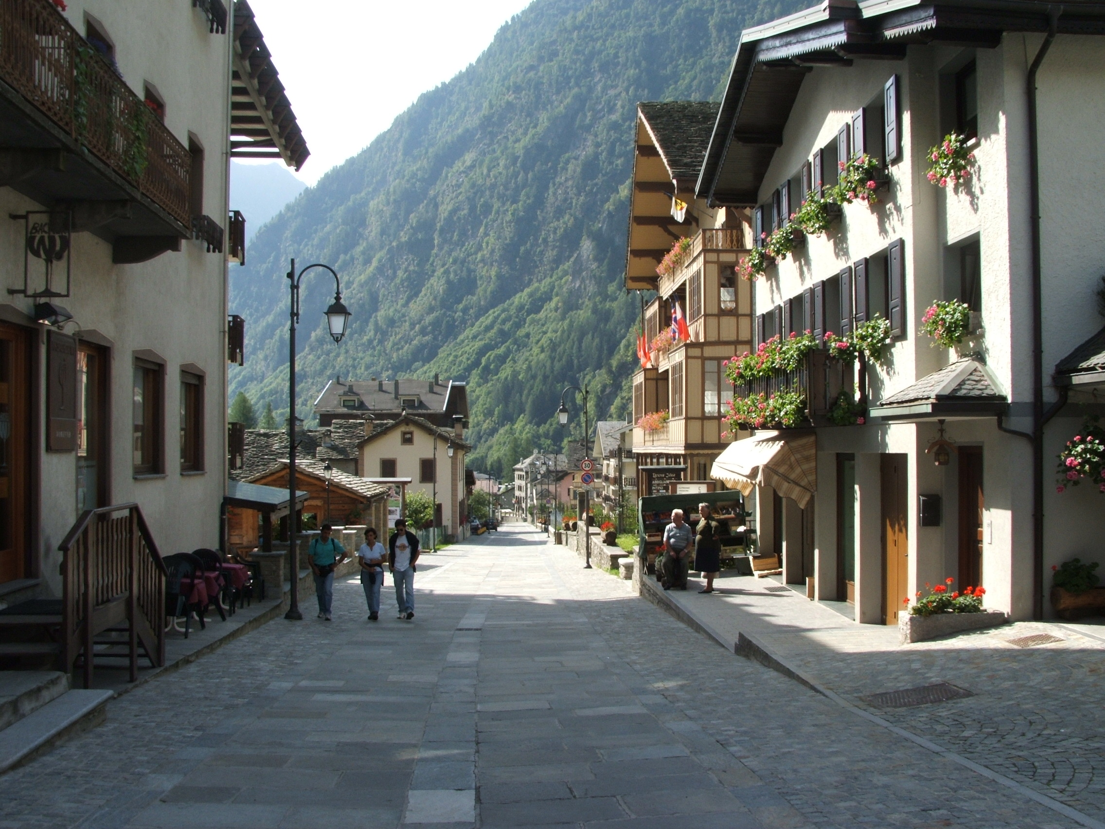 Immagine da Alagna Valsesia